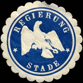 Sealing stamp Title: Regierung - Stade Description: blau, weiß, geprägt Place: Stade size: 4 cm